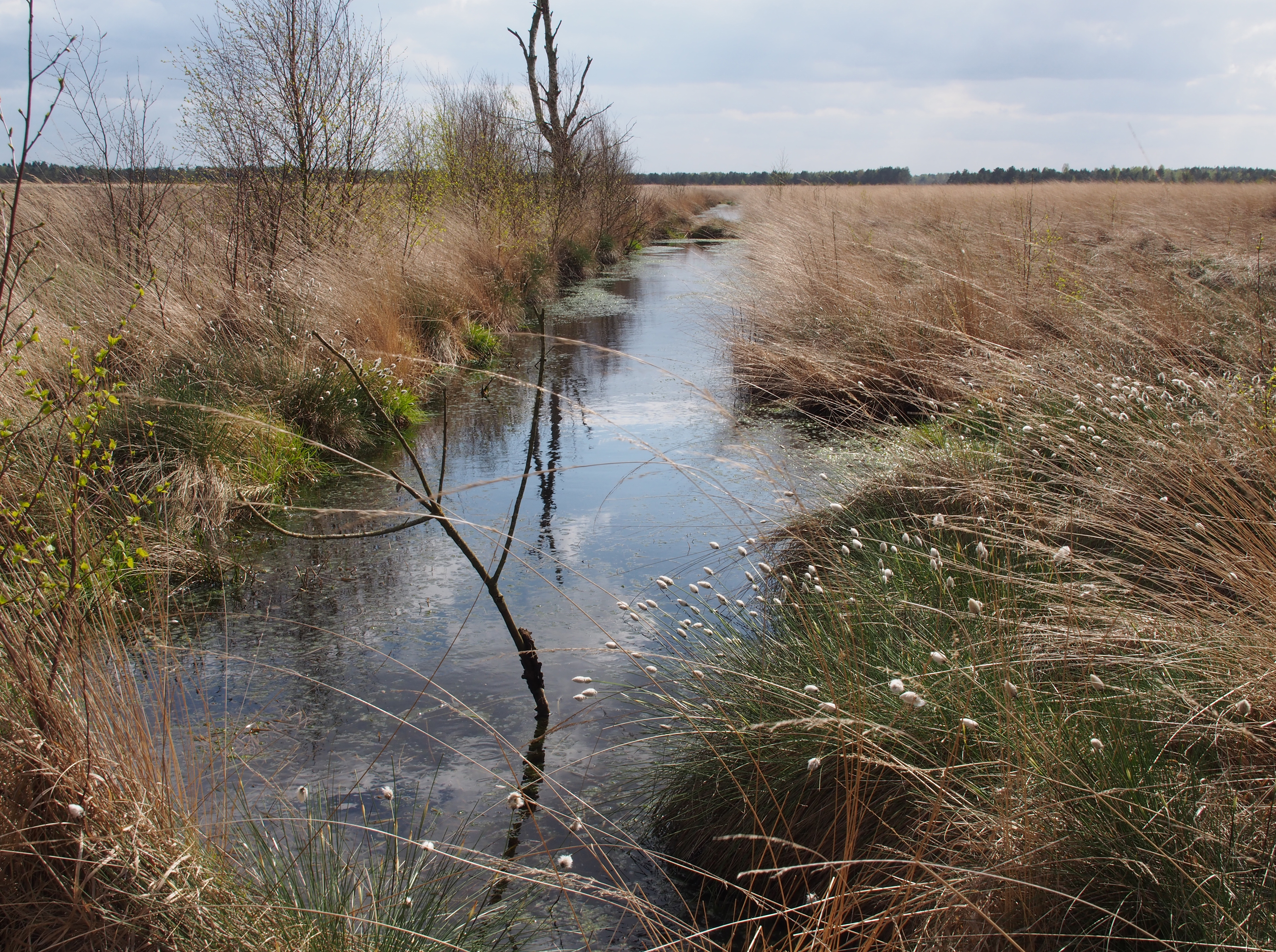 Gestauter Moorgraben im Großen Moor bei Becklingen, mit Scheidenwollgras